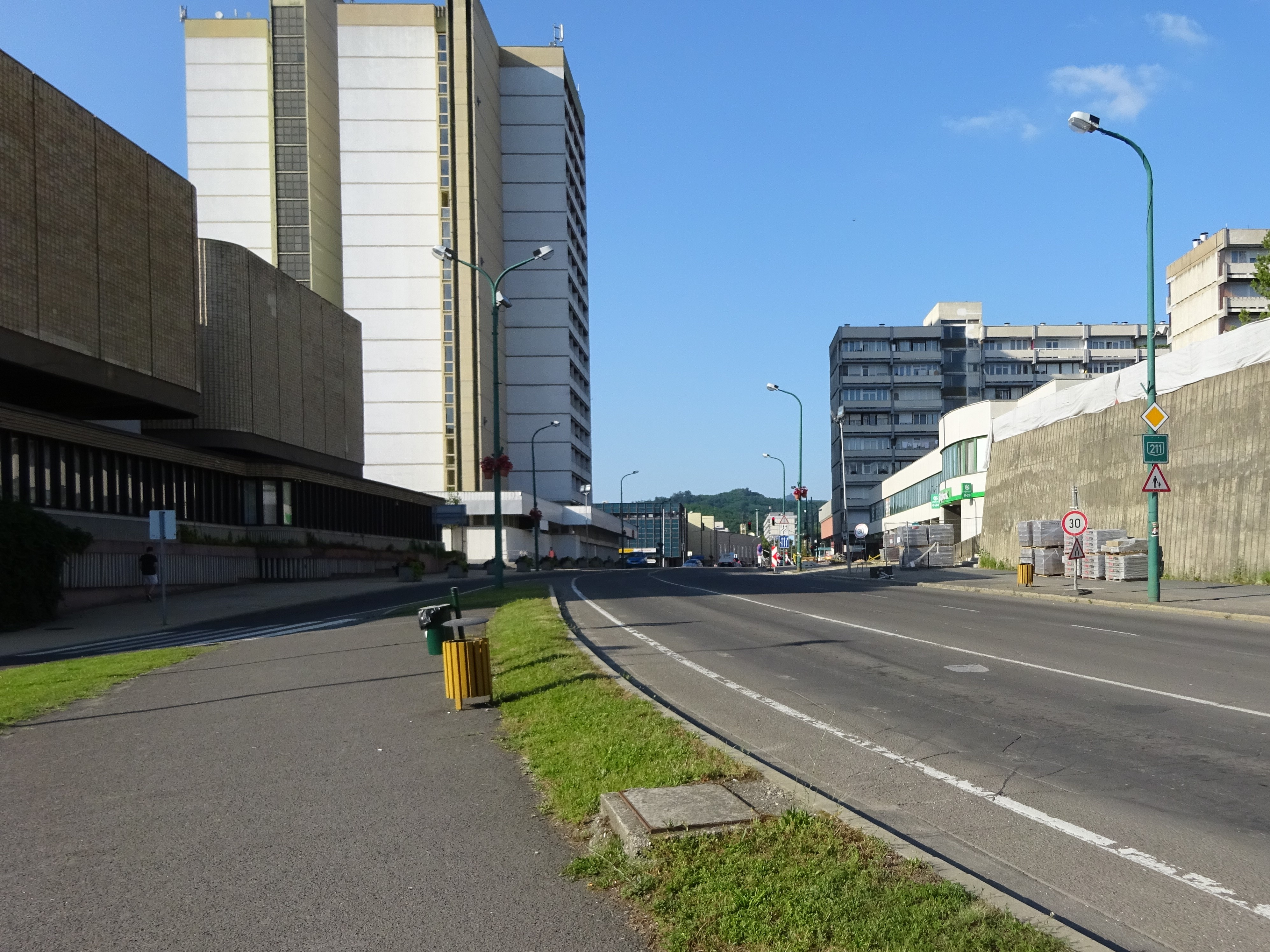 211-es főút: Salgótarján, Rákóci út